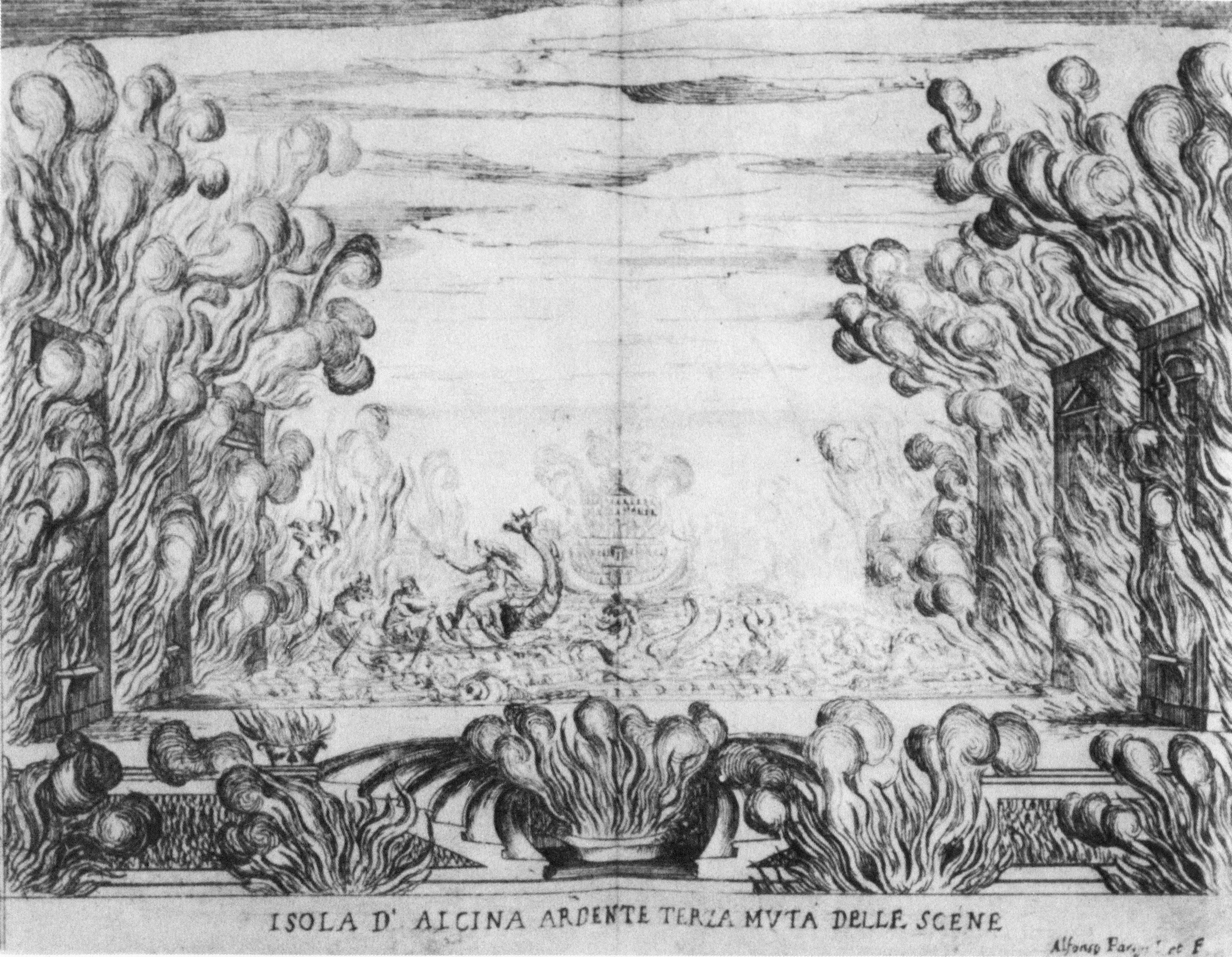 Francesca Caccini - La liberazione di Ruggiero dall'isola d'Alcina - Isola d'Alcina ardente - Terza muta delle scene - Conflagration on the island of Alcina